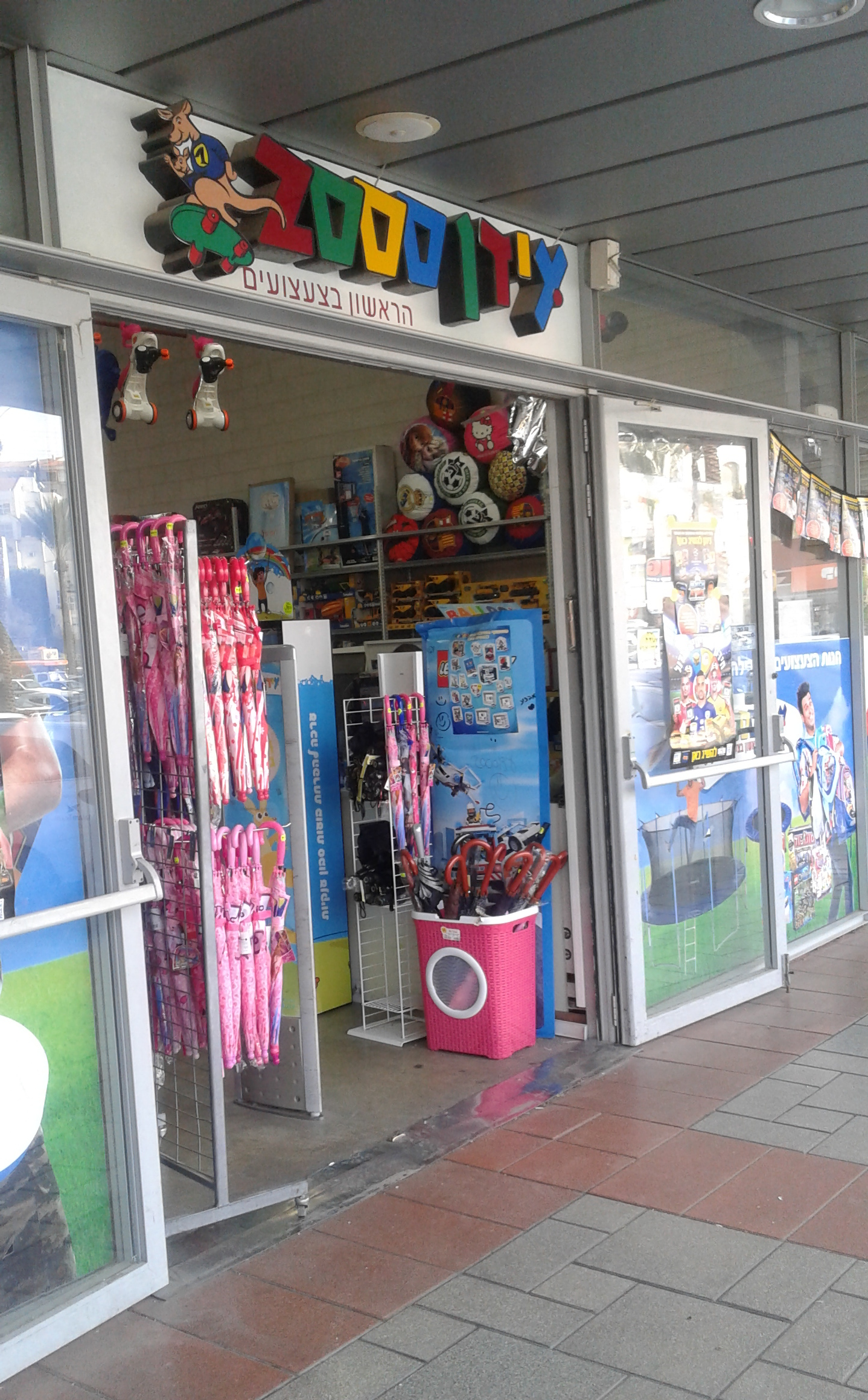 סניף עידן 200 ביקנעם עילית